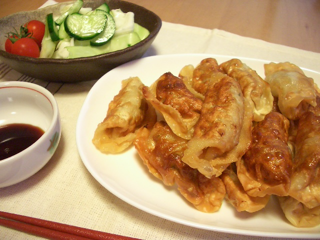 ビールのおつまみにいかが？